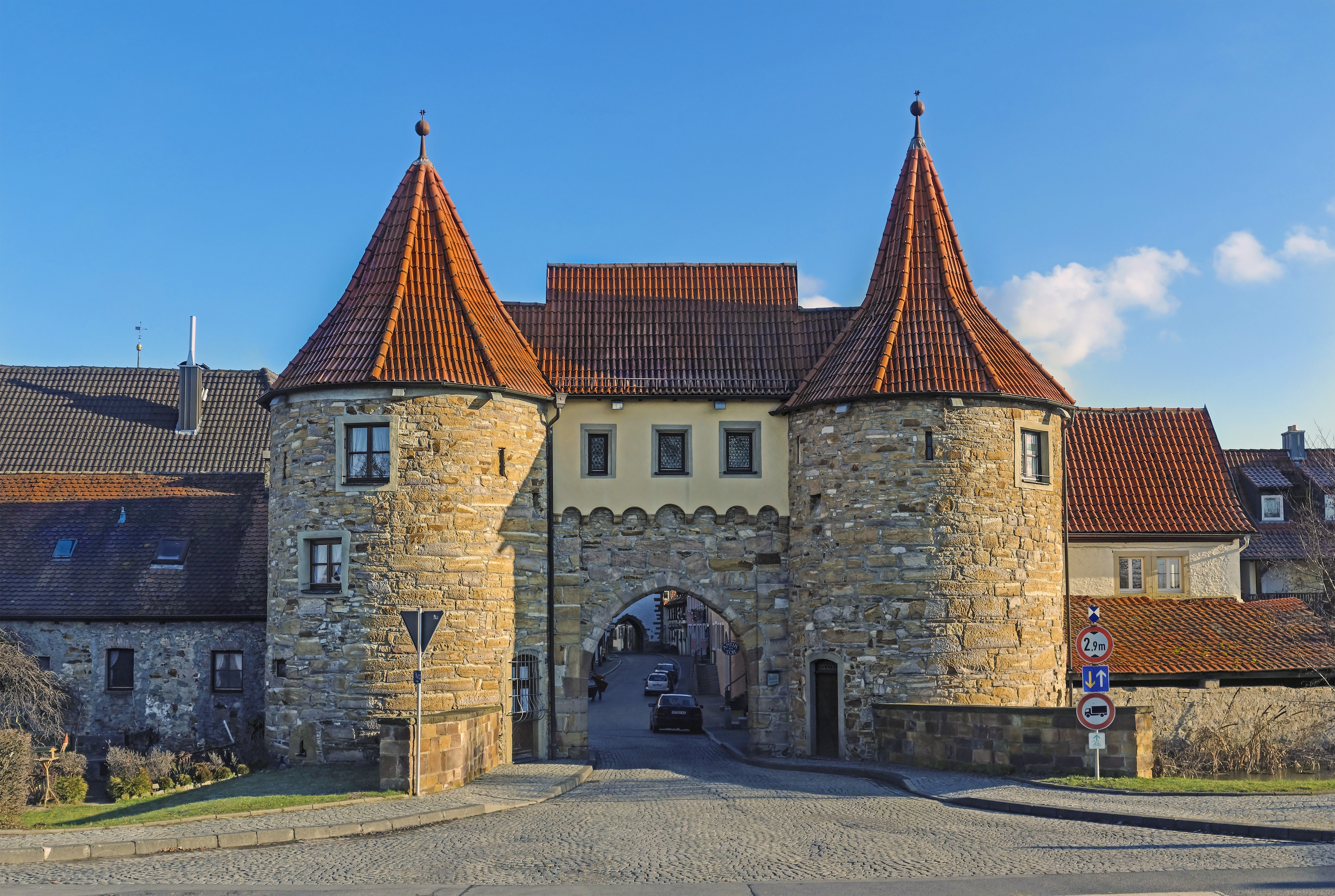 Westliches Befestigungstor von Prichsenstadt in Unterfranken mit Fachwerkaufsatz, erbaut im 15. und 16. Jahrhundert. This image was created with Hugin.